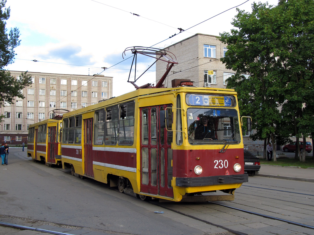 Смоленск ЛМ-93 230+229